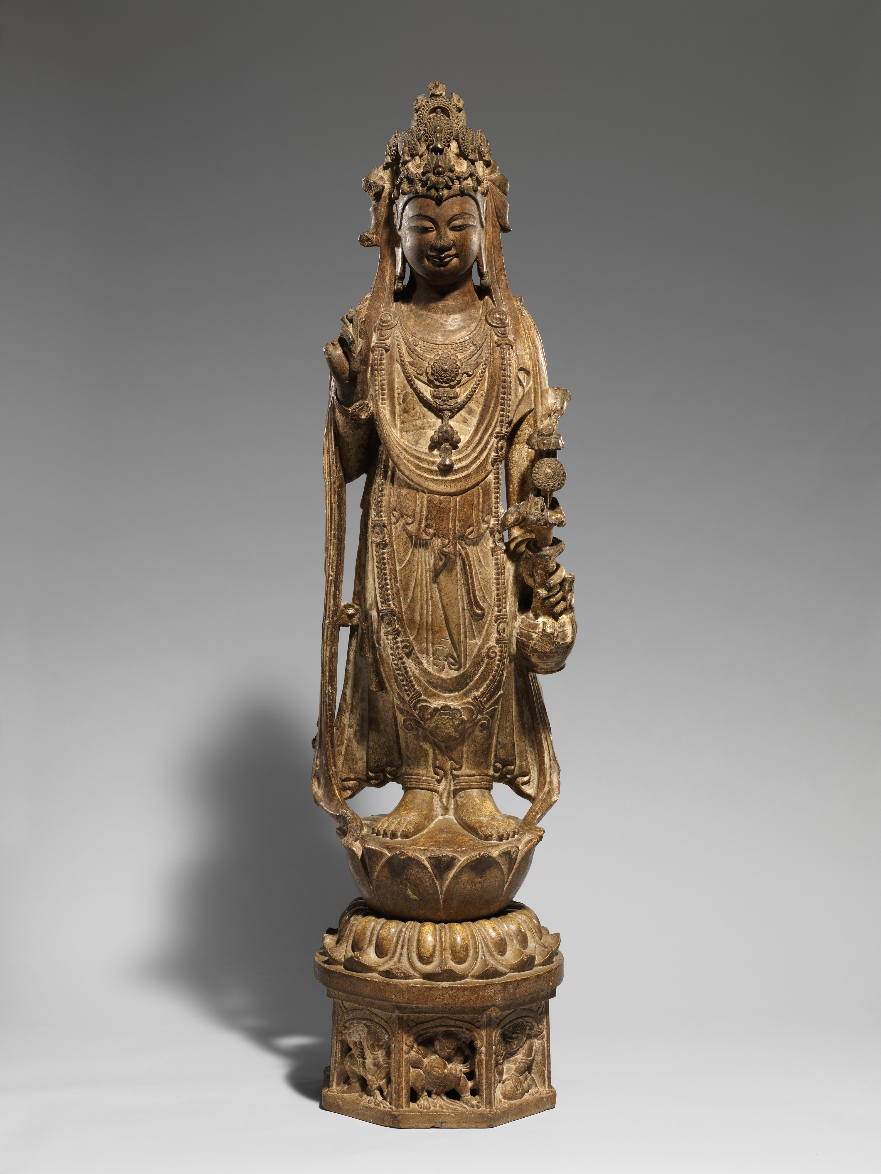 China; Figure; Sculpture